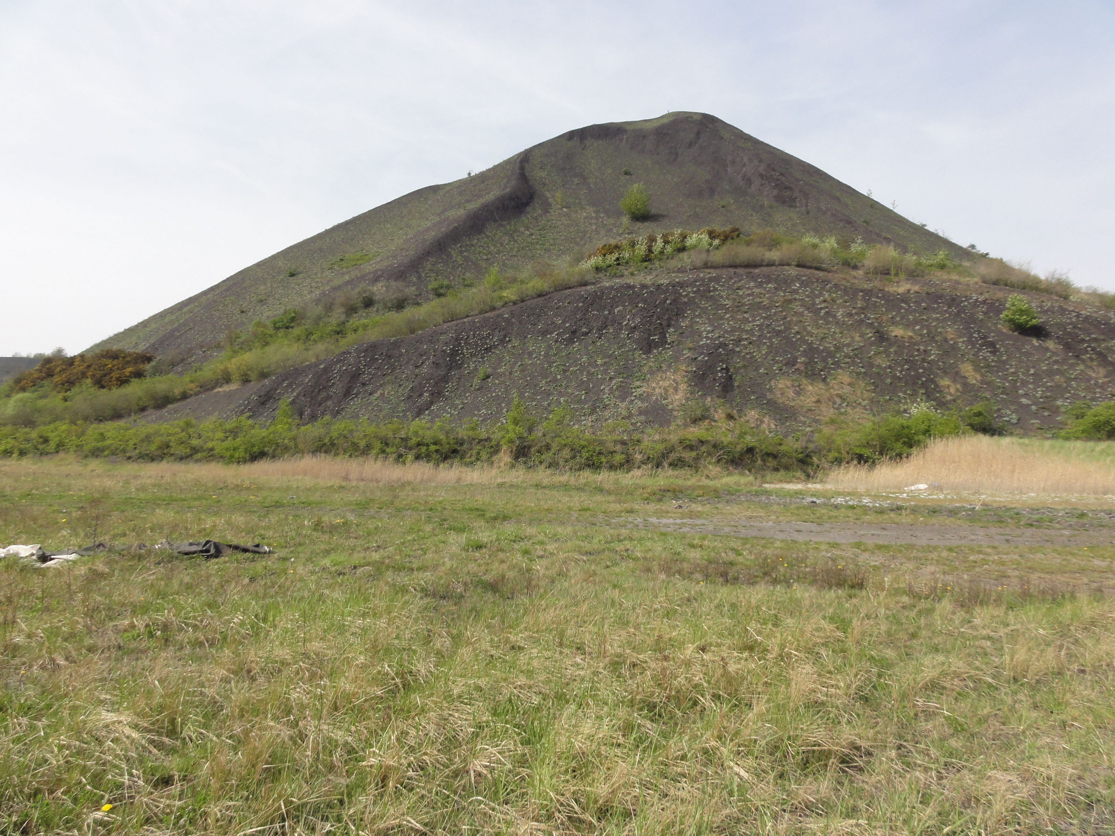 Terril n° 87 dit Lavoir Hénin Est, fosse n° 2 - 2 bis de la Compagnie des mines de Dourges et lavoir dans le bassin minier du Nord-Pas-de-Calais, Dourges, Pas-de-Calais, Nord-Pas-de-Calais, France. Le terril no 87 est inscrit sur la liste du patrimoine mondial de l'Unesco le 30 juin 2012 et y constitue en partie le site no 46.